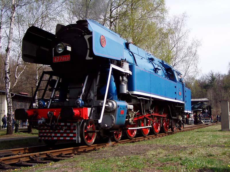 Bildbeschreibung: 477.043 im Eisenbahnmuseum Lužná u Rakovníka... Quelle: selbst fotografiert... Fotograf/Zeichner: Rainerhaufe... Datum: 2005... Sonstiges: ...